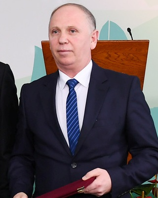 Vladislav Qədirov